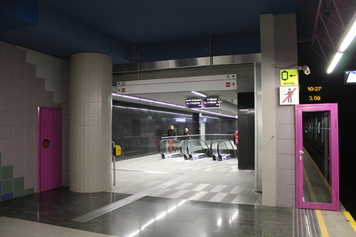 Łącznik prowadzący z peronu stacji I linii metra A14 Świętokrzyska na peron stacji II linii metra C11 Świętokrzyska.